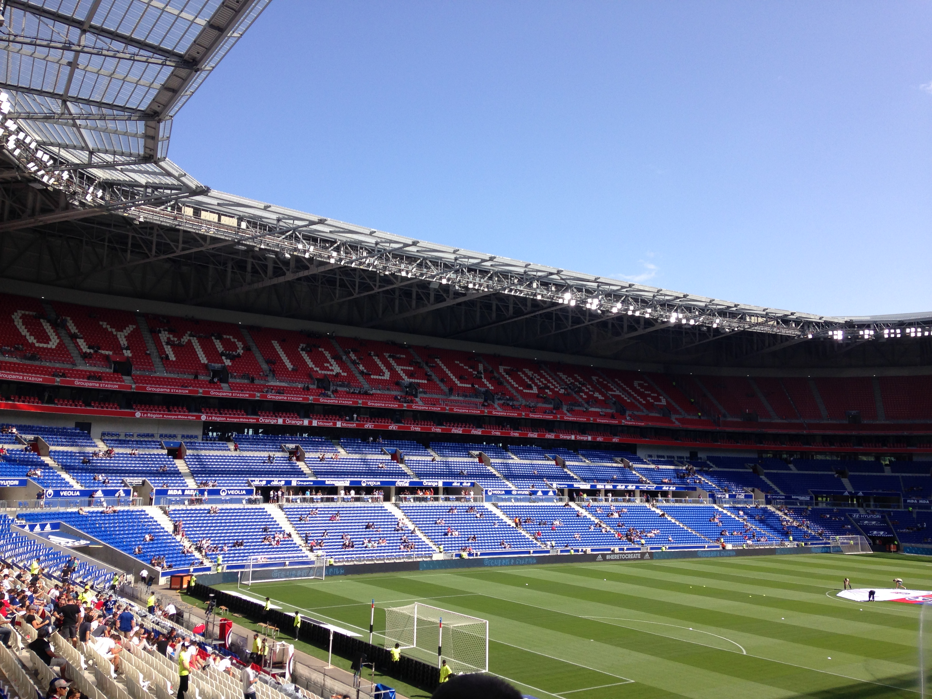 Parc OL